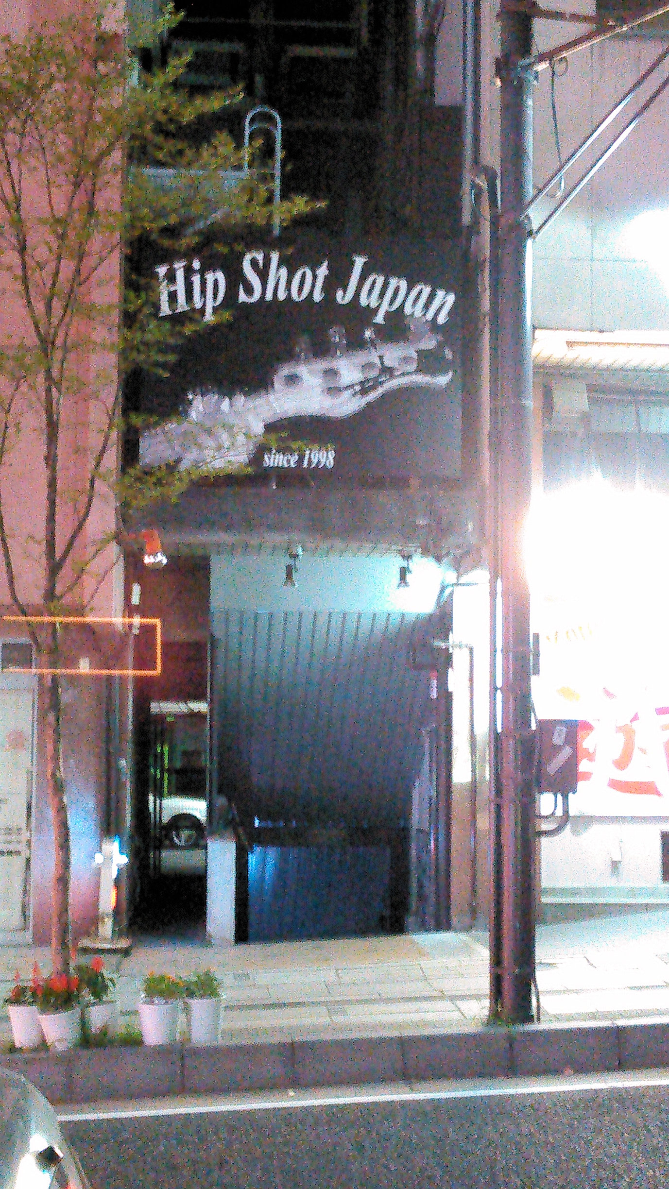 郡山市のライブハウス HIPSHOT JAPAN